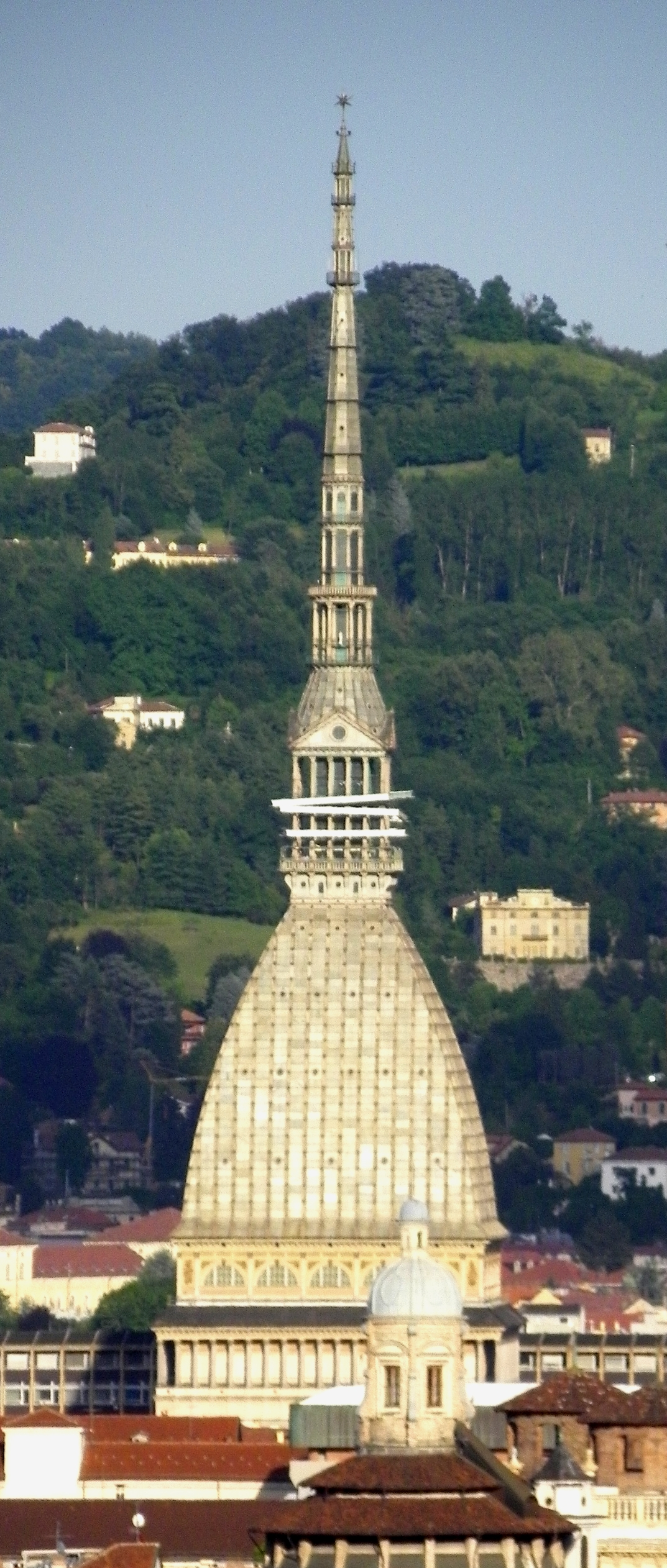 La Mole Antonelliana vista da Piazza Statuto